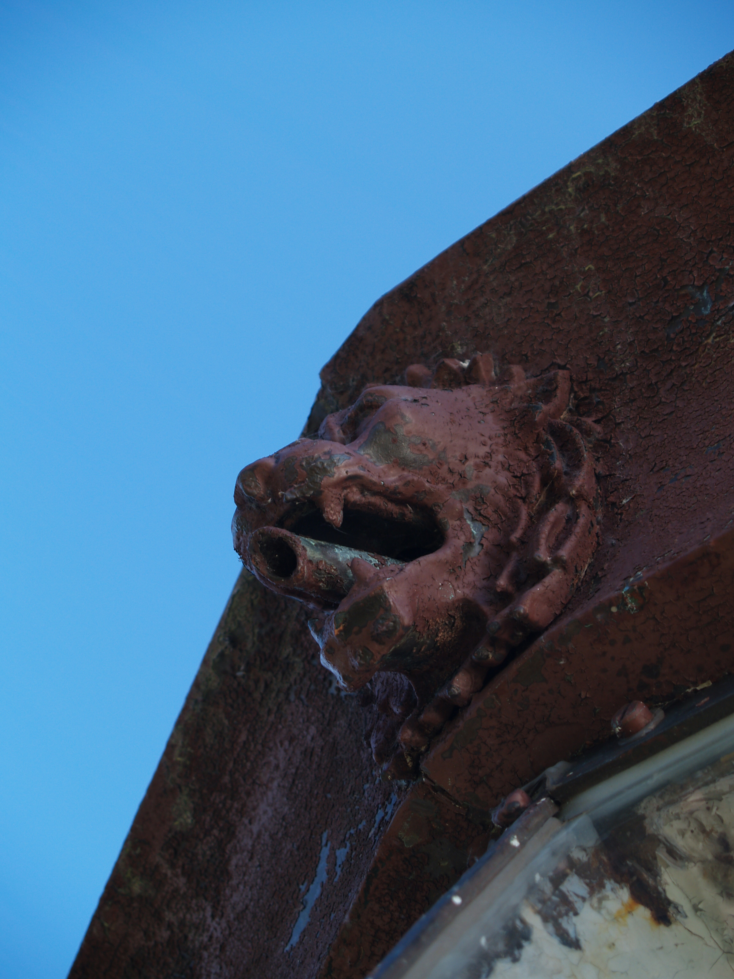 Keri tuletorn. Üks tuleruumi välimise ülaääre veesülititest.